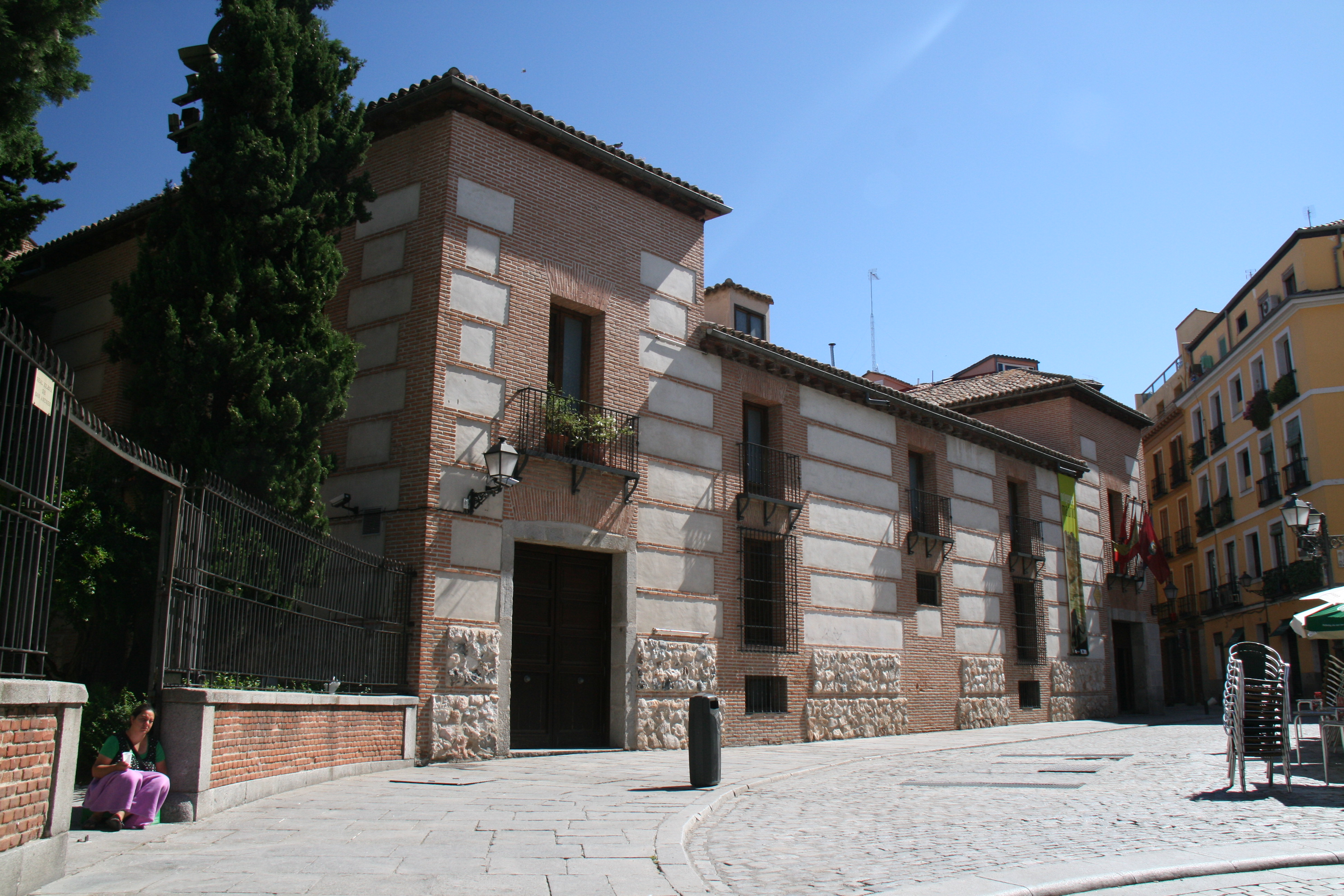 Museo de los Orígenes